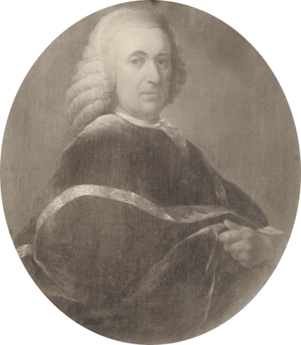 Portret van Abraham Gevers (1712-1780), lid van de vroedschap en burgemeester van Rotterdam